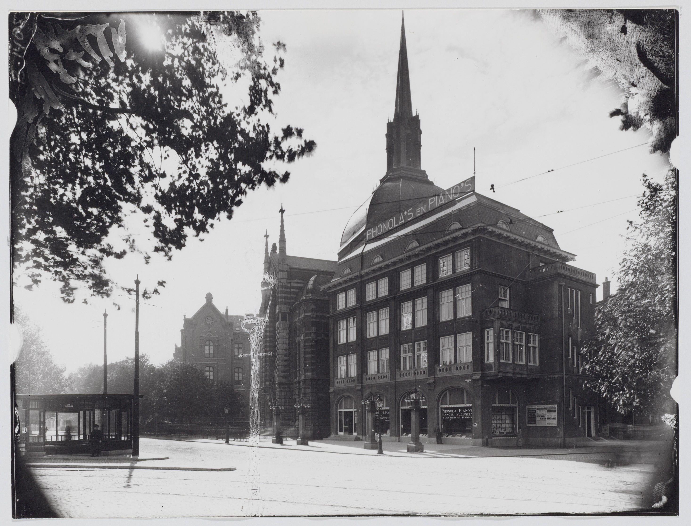 Beschrijving Stadhouderskade 19 Documenttype foto Vervaardiger Merkelbach, Atelier J. Collectie Collectie Atelier J. Merkelbach Geografische naam Stadhouderskade Inventarissen Afbeeldingsbestand B00000002677 Generated with Dememorixer